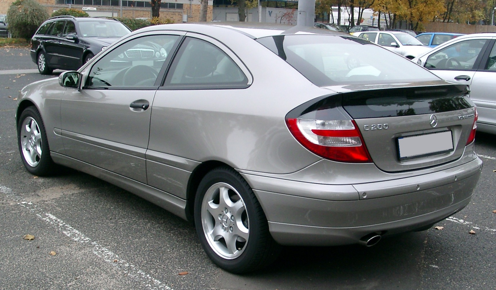 Mercedes-Benz W203 Sportcoupe